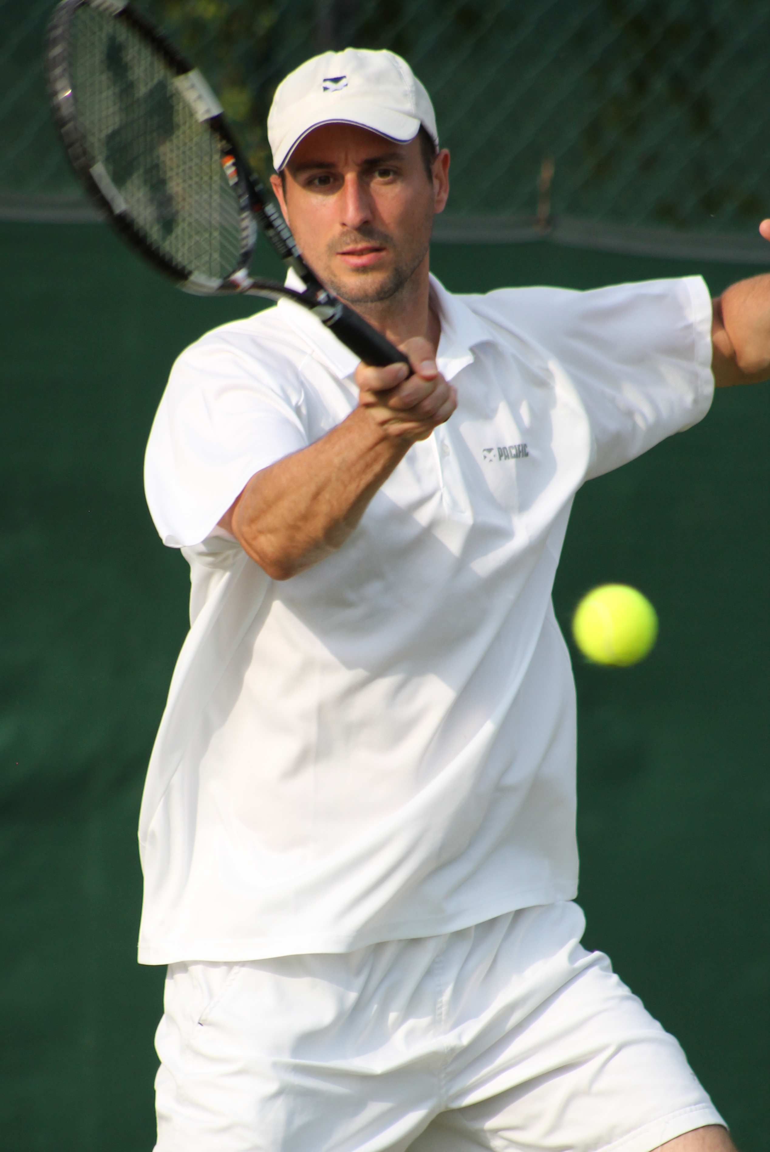 Zelenay WMQ15 (5)